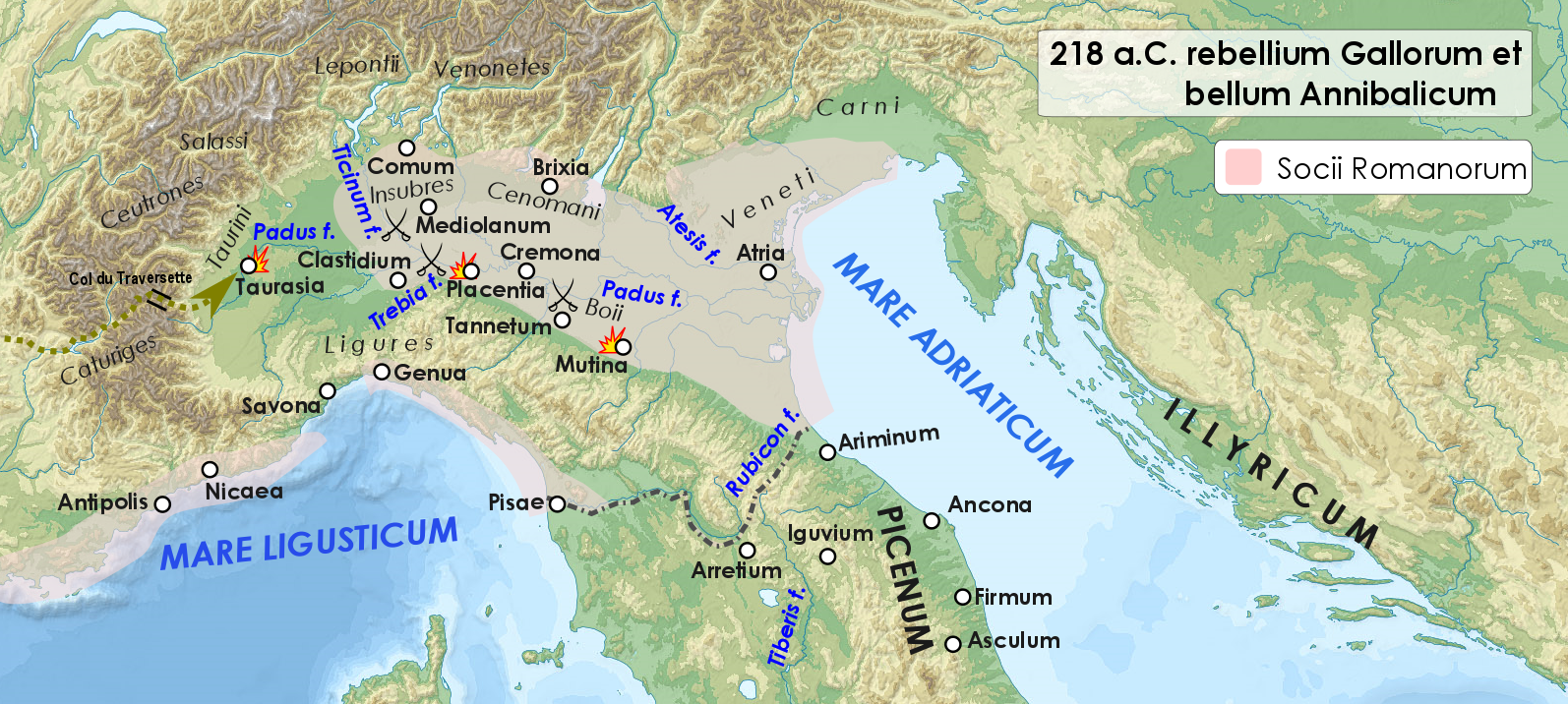 La Gallia cisalpina nel 218 a.C.: dalla rivolta dei Boii (Piacenza e Mutina) all'invasione cartaginese da parte di Annibale (battaglie del Ticino e della Trebbia)